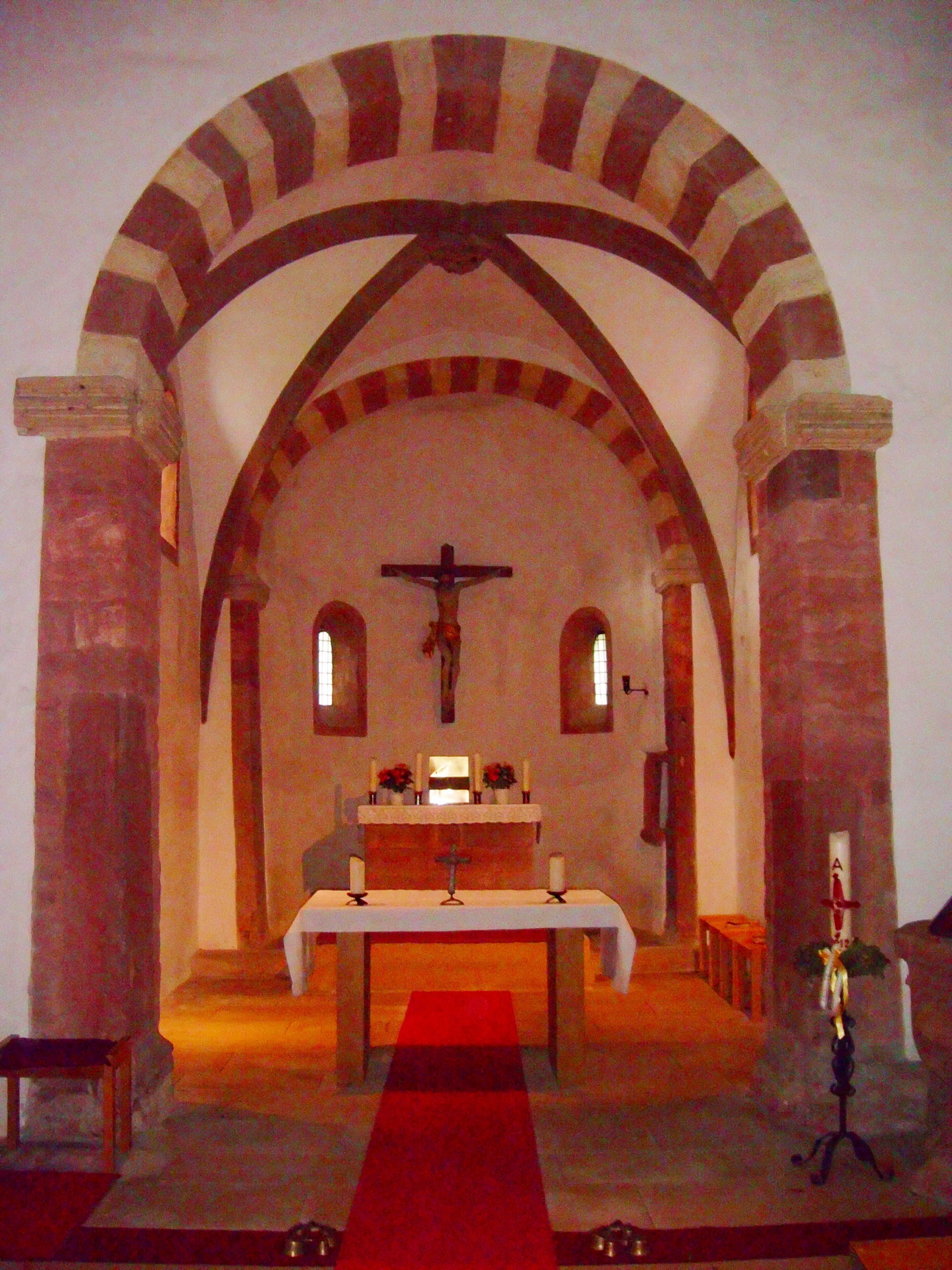 Bubenheim (Pfalz), St. Peterskirche, innen